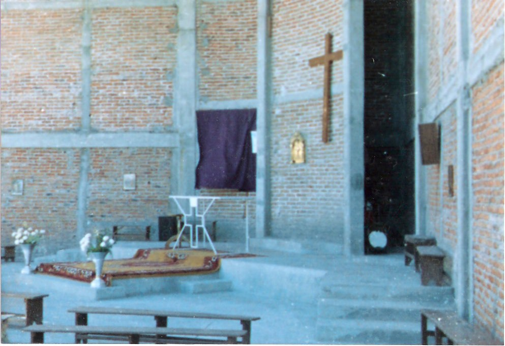 Primeras misas celebradas en el naciente templo, se puede apreciar el sagrario.